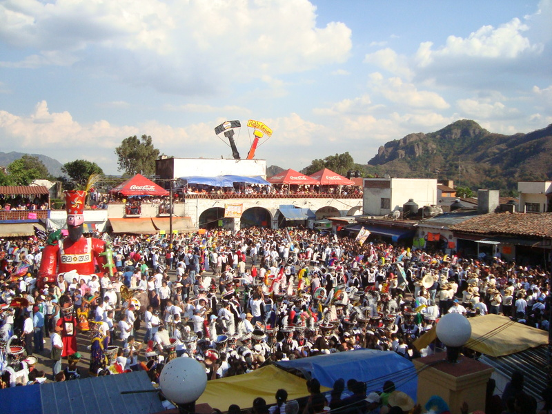 Carnaval Tepoztlan